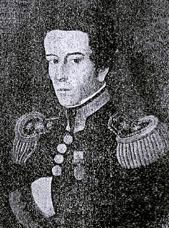 Retrato al óleo del Coronel Tomás Espora